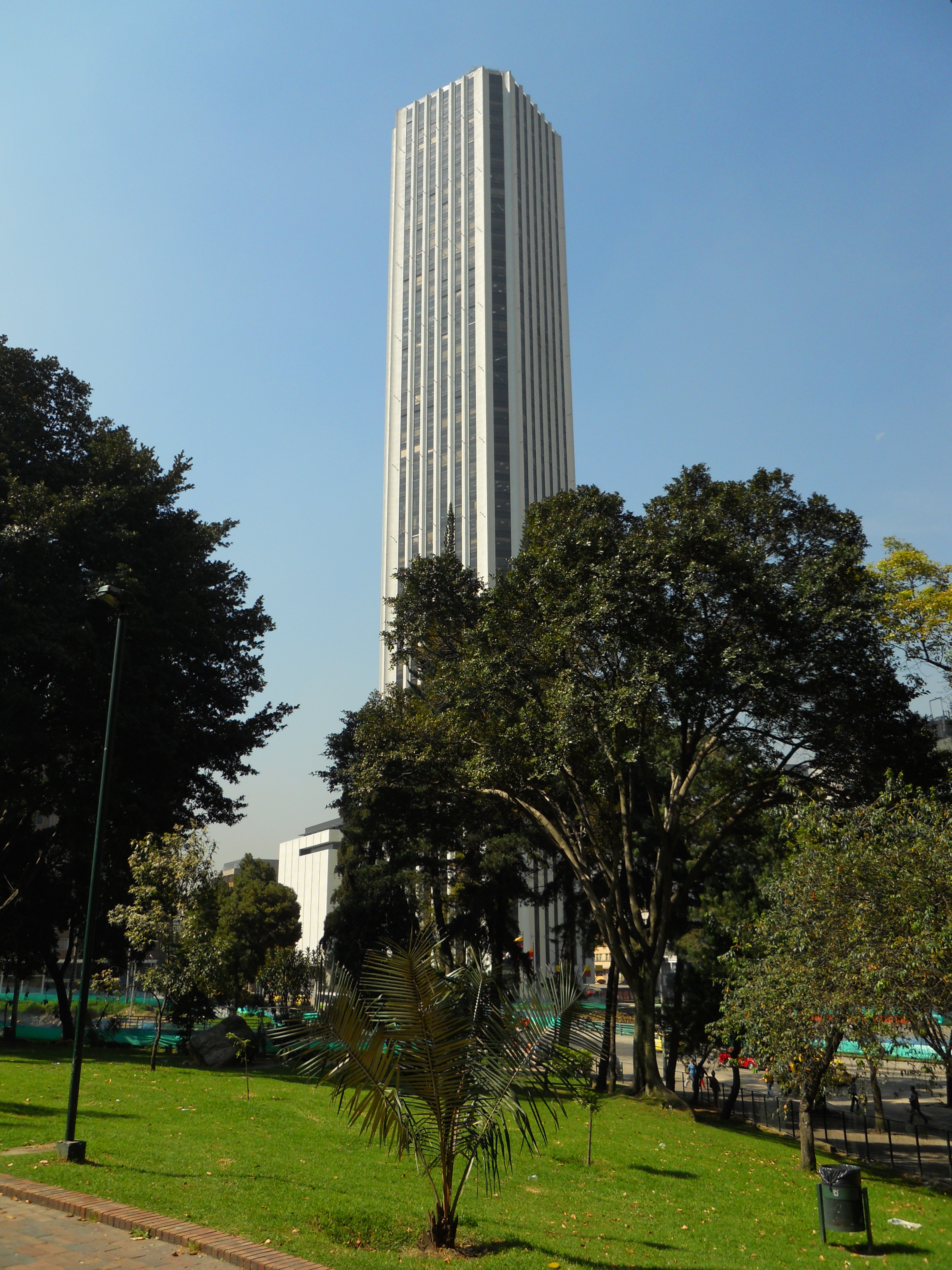 Bogotá. Edificio Colpatria desde el Parque de la Independencia.